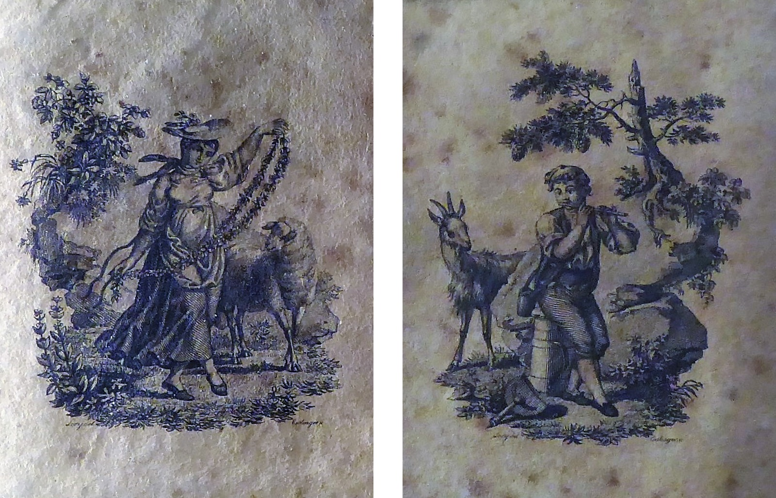 Das Mädchen mit Blumengirlande und Der musizierende Senn, Stiche von Gabriel Lory dem Älteren auf dem Einband des Damenalmanachs «Alpenrosen» aus dem Jahr 1818